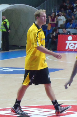 Partido Real Madrid-CB Canarias, marzo 2015